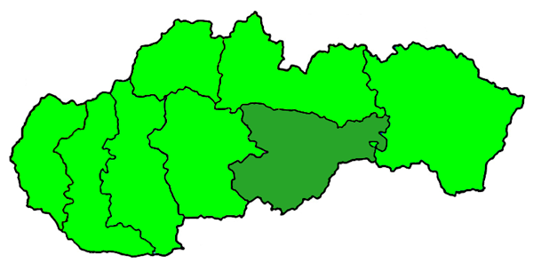 Mappa della diocesi cattolica (roman catholic) di Roznava, in Slovacchia. Lavoro personale.